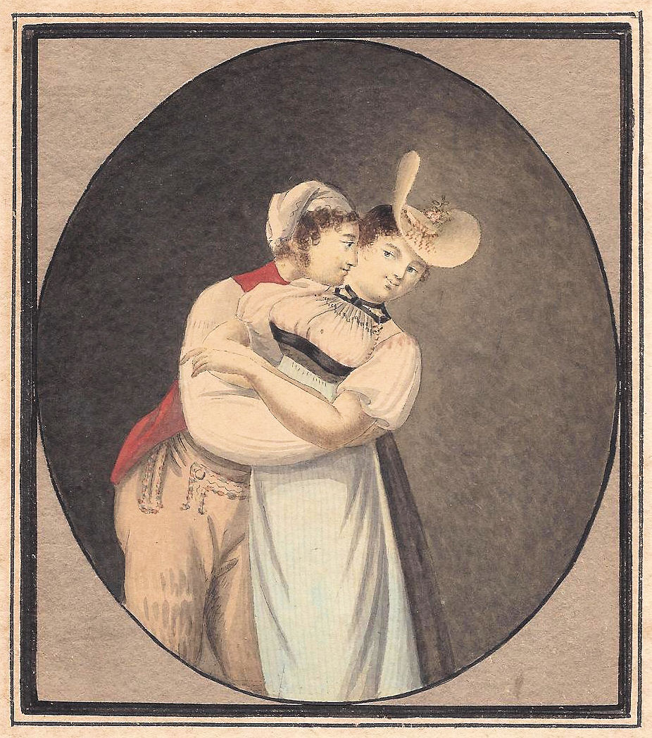 Les caresseurs d'Oberhasli Gouache von Gottfried Emanuel Wysard, 14,1 cm x 11,8 im Oval. Rahmenrückseitig Legatsvermerk aus UK von 1831. Vgl. Kolorierte Umrissradierung: Les carresseur d'Oberhasli, Collection British Musem.